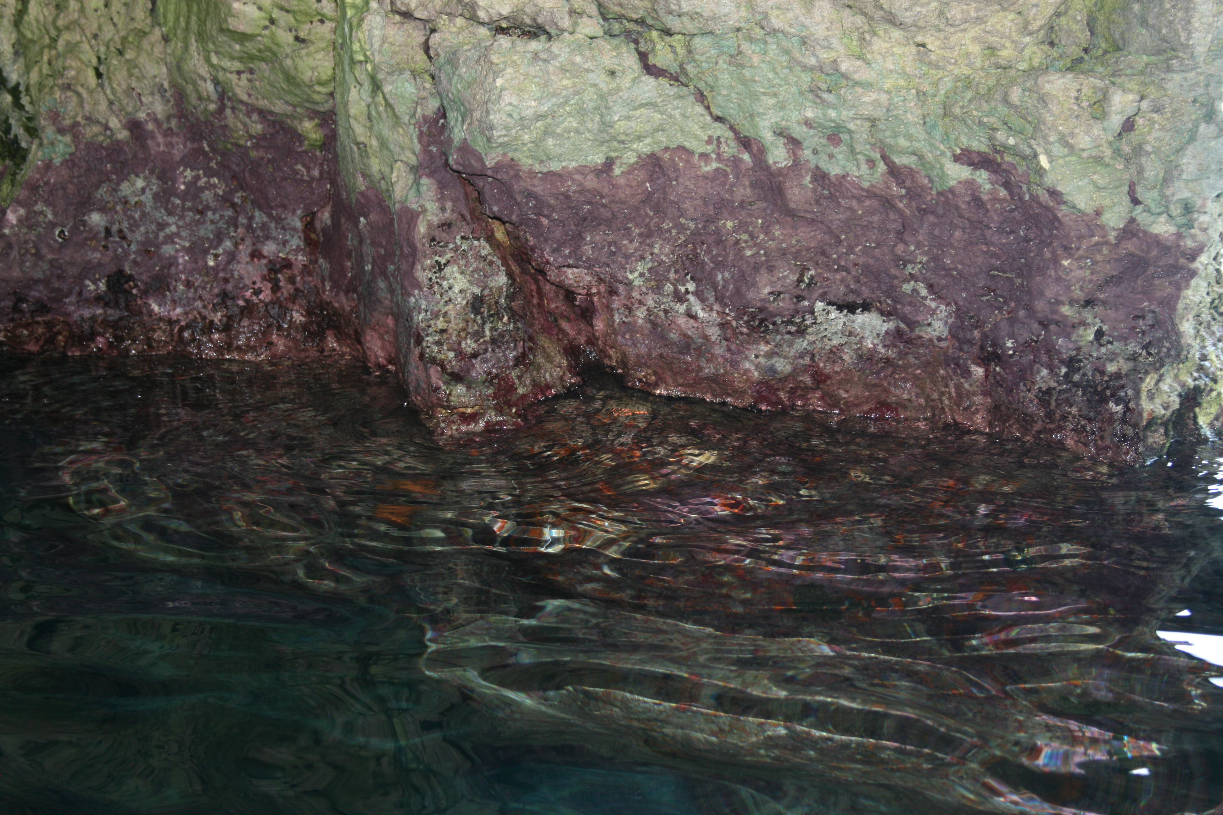 Blaualgen in der Blauengrotte